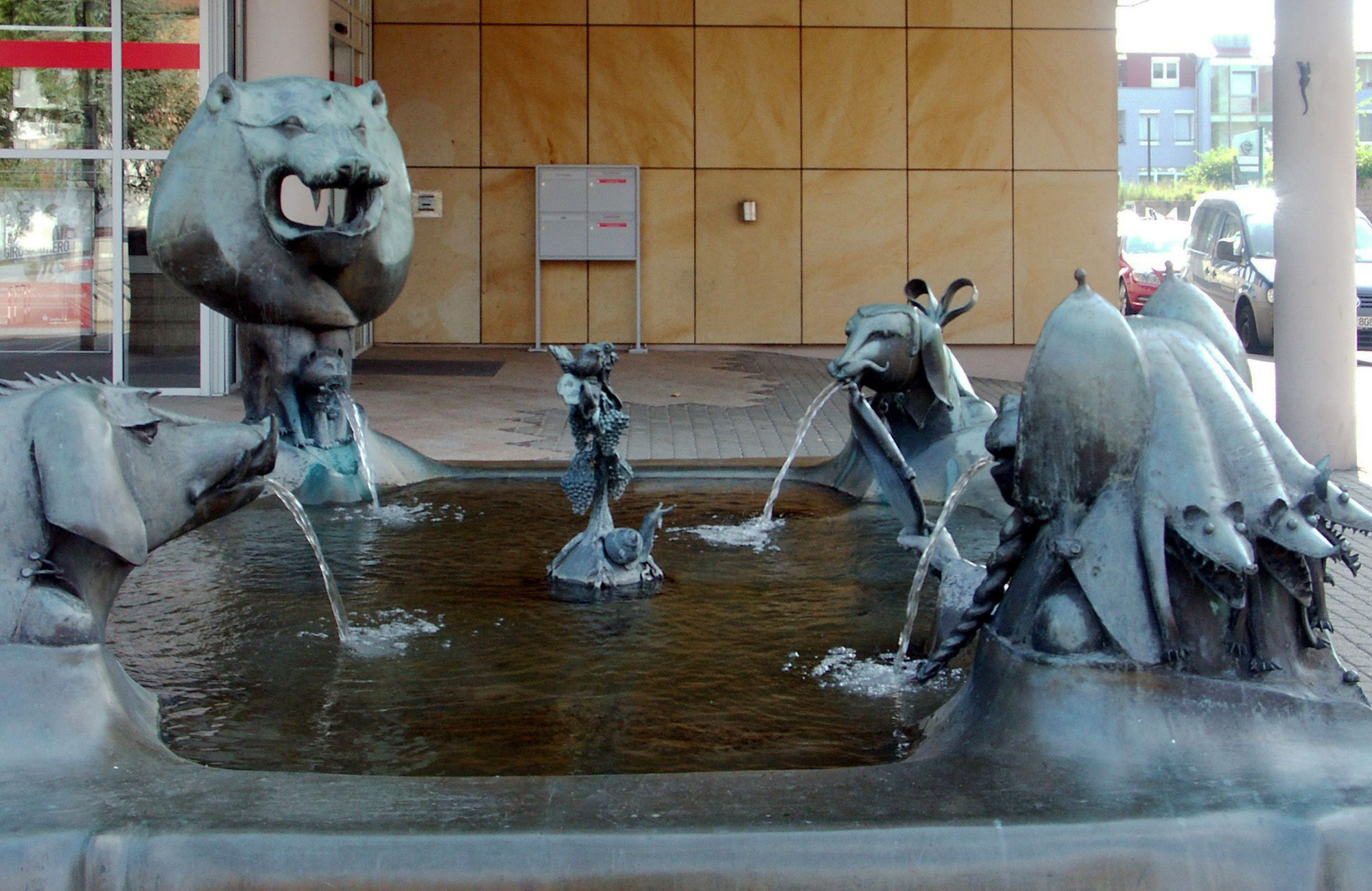 Der Weinbrunnen von Gernot Rumpf in Bad Bergzabern. Der Brunnen zeigt Lamm, Affe, Löwe und Schwein. Vor dem Brunnen ist folgender Text zu lesen: Als Noah, der Urahn aller Winzer, mit seiner Arche gestrandet war, schenkte ihm der Engel des Herrn eine Weinrebe. Damit die junge Rebe gut gedeihe, sollte er sie mit dem Blut eines Lammes und eines Affen begießen. Der Teufel, der diese Szene verfolgt hatte, fügte Weiteres hinzu: Blut vom Löwen und vom Schwein. Seit dieser Zeit gilt vom Wein: Wer einen Krug trinkt, wird fromm und zahm wie ein Lamm. Wer zwei trinkt, gelehrig und lustig wie ein Affe. Wer drei trinkt, stark und brüllend wie Löwe. Wer aber vier trinkt, der grunzt und wälzt sich wie ein Schwein.